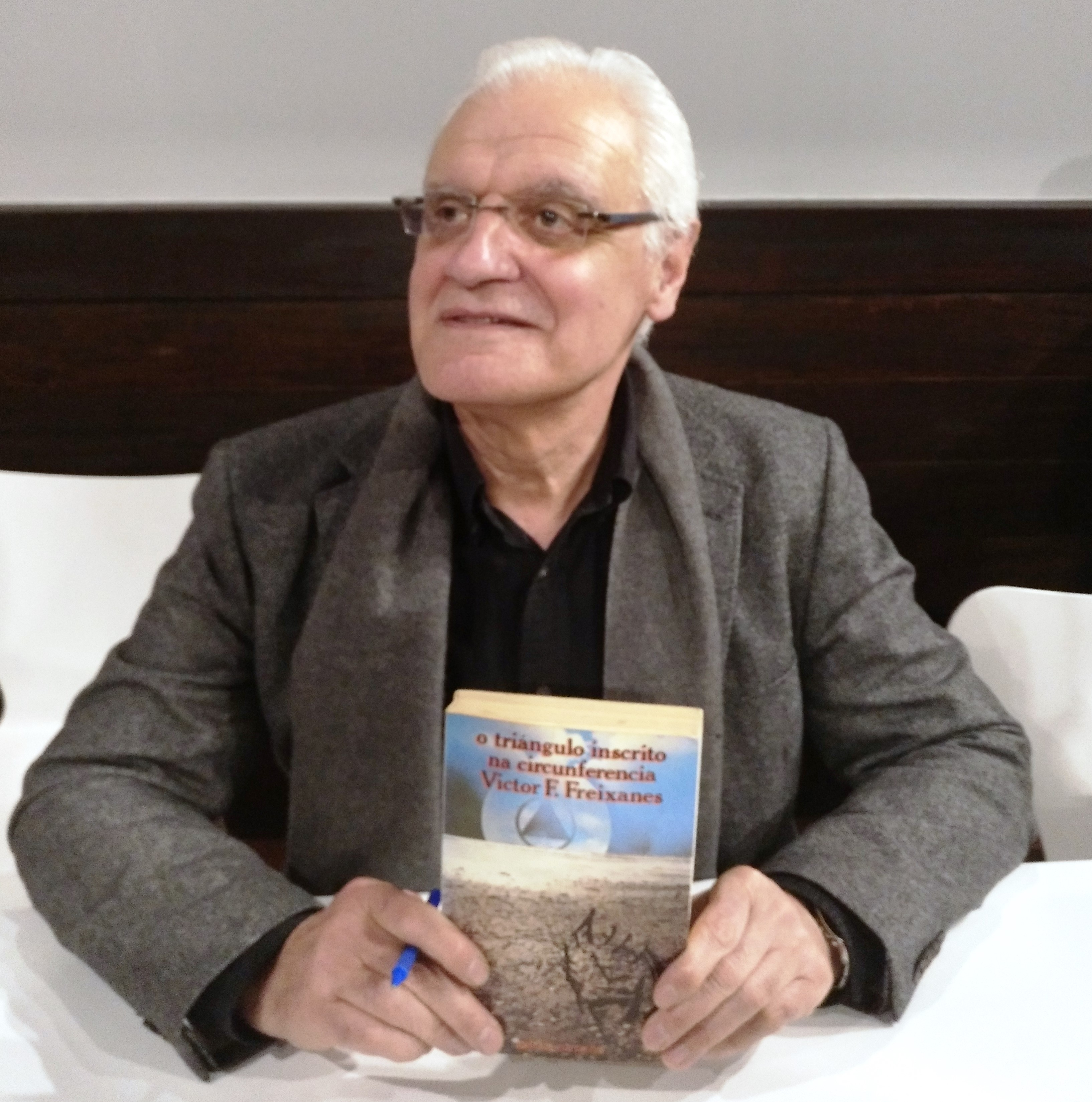 Víctor Freixanes e "O triángulo inscrito na circunferencia" na Casa das Campás en Pontevedra o 26-02-2019